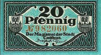 Notgeld aus Cottbus zu 20 Pfennig andere Versionen